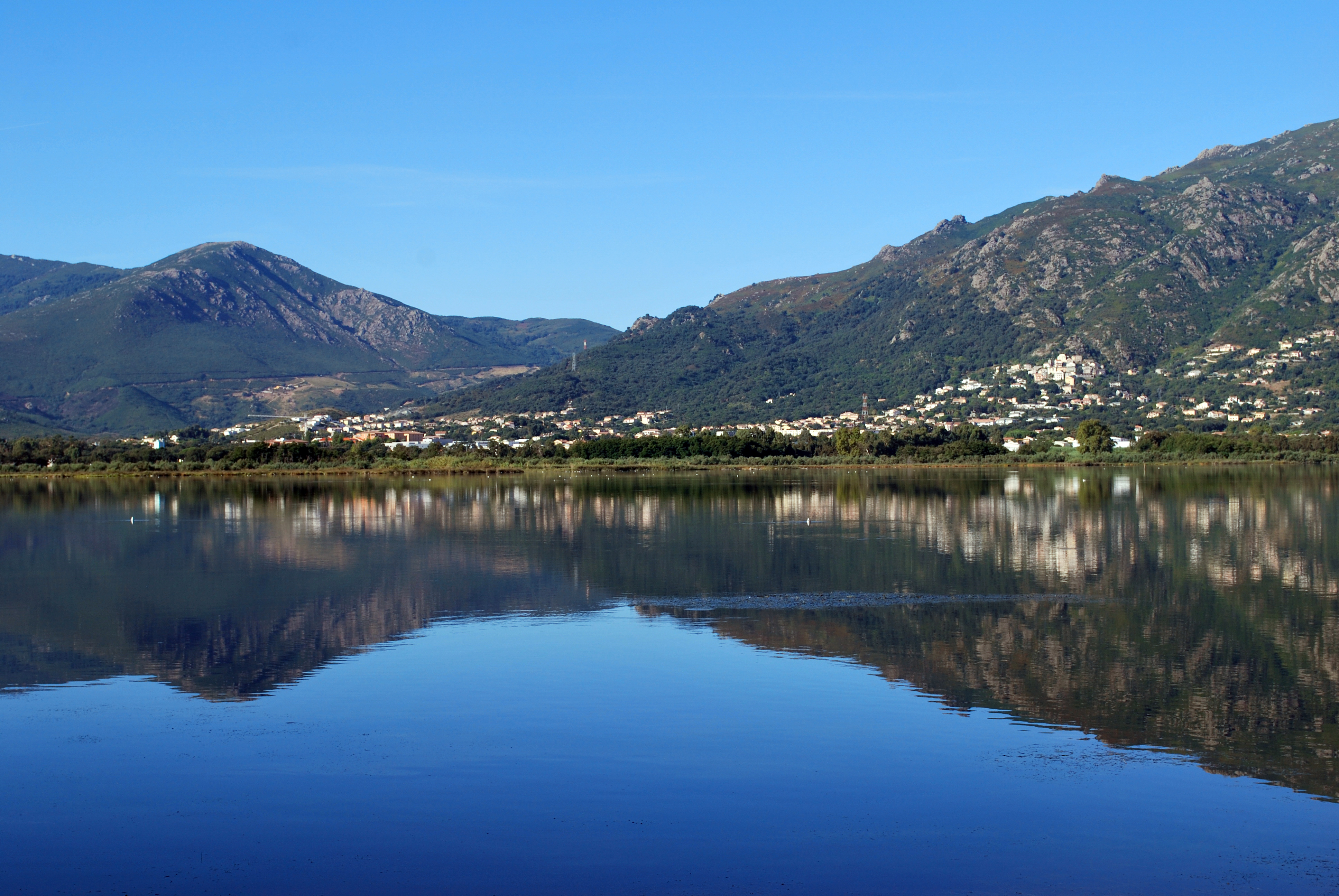 Réserve naturelle de l'étang de Biguglia